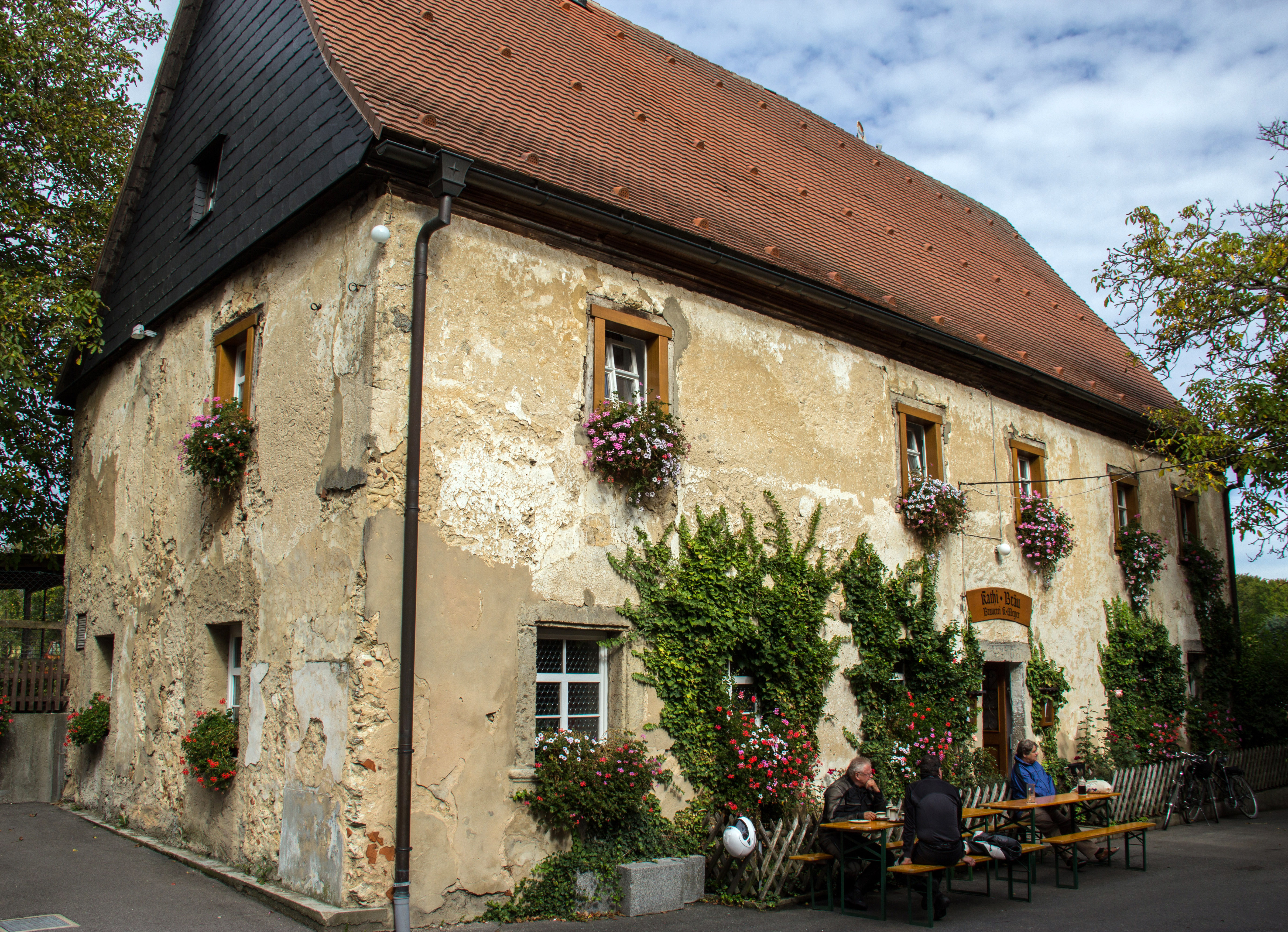 Ehemaliger Rittersitz in Heckenhof